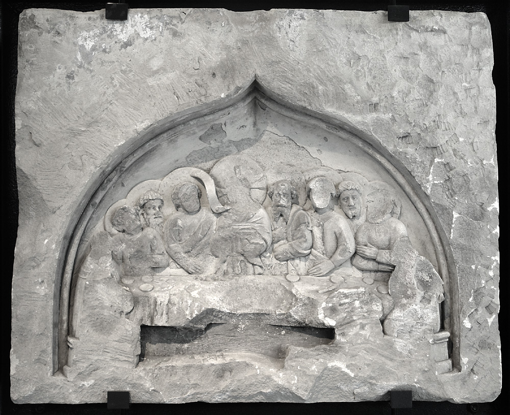 Focke-Museum Bremen: Beim Abriß der Ruine von St. Ansgarii 1958 wurde unter dem Putz an der Nordwand des Chores ein um 1430 entstandenes Relief gefunden. Es zeigt Jesus beim letzten Abendmahl und bildete die Bekrönung einer Wandnische für geweihte Hostien. Die Köpfe der Heiligen wurden abgeschlagen. Christoph Pezel veranlaßte 1582 im Zuge der Reformation die Demolierung oder Entfernung aller Bildwerke aus den städtischen Pfarrkirchen in Bremen. Material: Sandstein. Quelle: Focke Museum